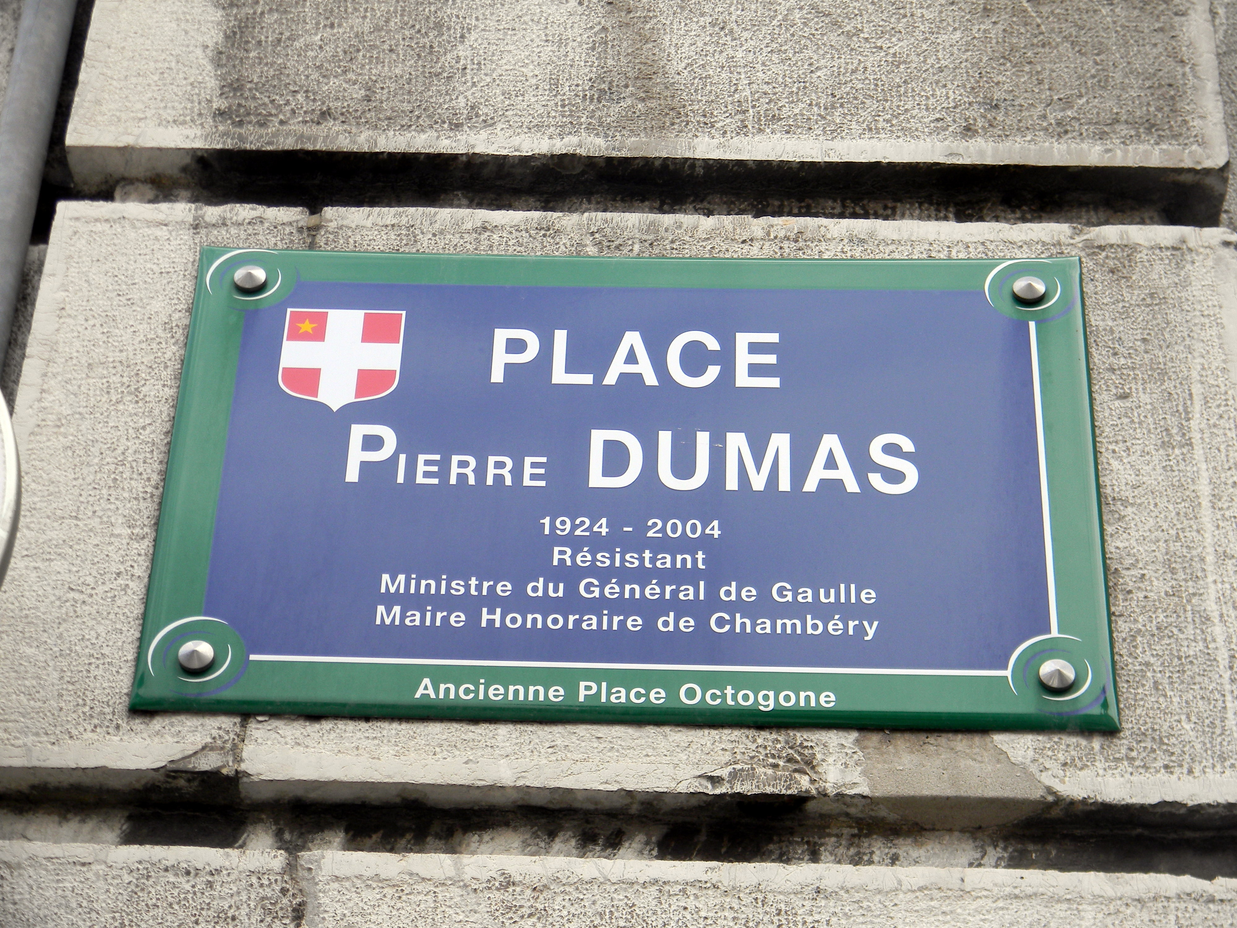 Place Pierre Dumas (1924-2004), Résistant, Ministre du Général de Gaulle, Maire honoraire de Chambéry. Ancienne place Octogone.